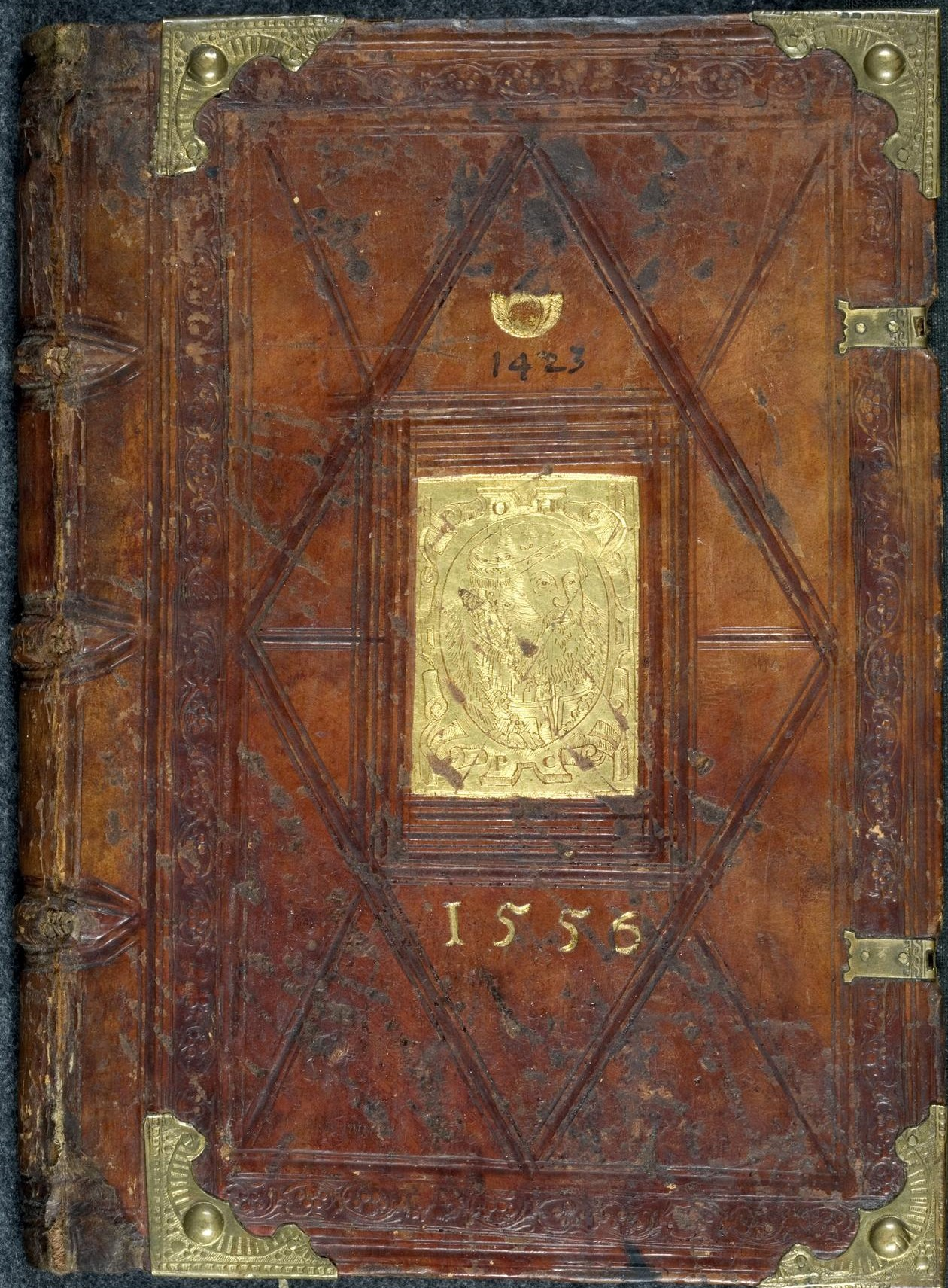 Codex Palatinus germanicus 12, Einband ("Ottheinrich-Einband"), Vorderdeckel: vergoldete Platte mit Bildnis Ottheinrichs, des Pfalzgrafen bei Rhein. Inschrift oben: O. H. (Ottheinrich); Inschrift unten: P. C. (Pfalzgraf, Churfürst).